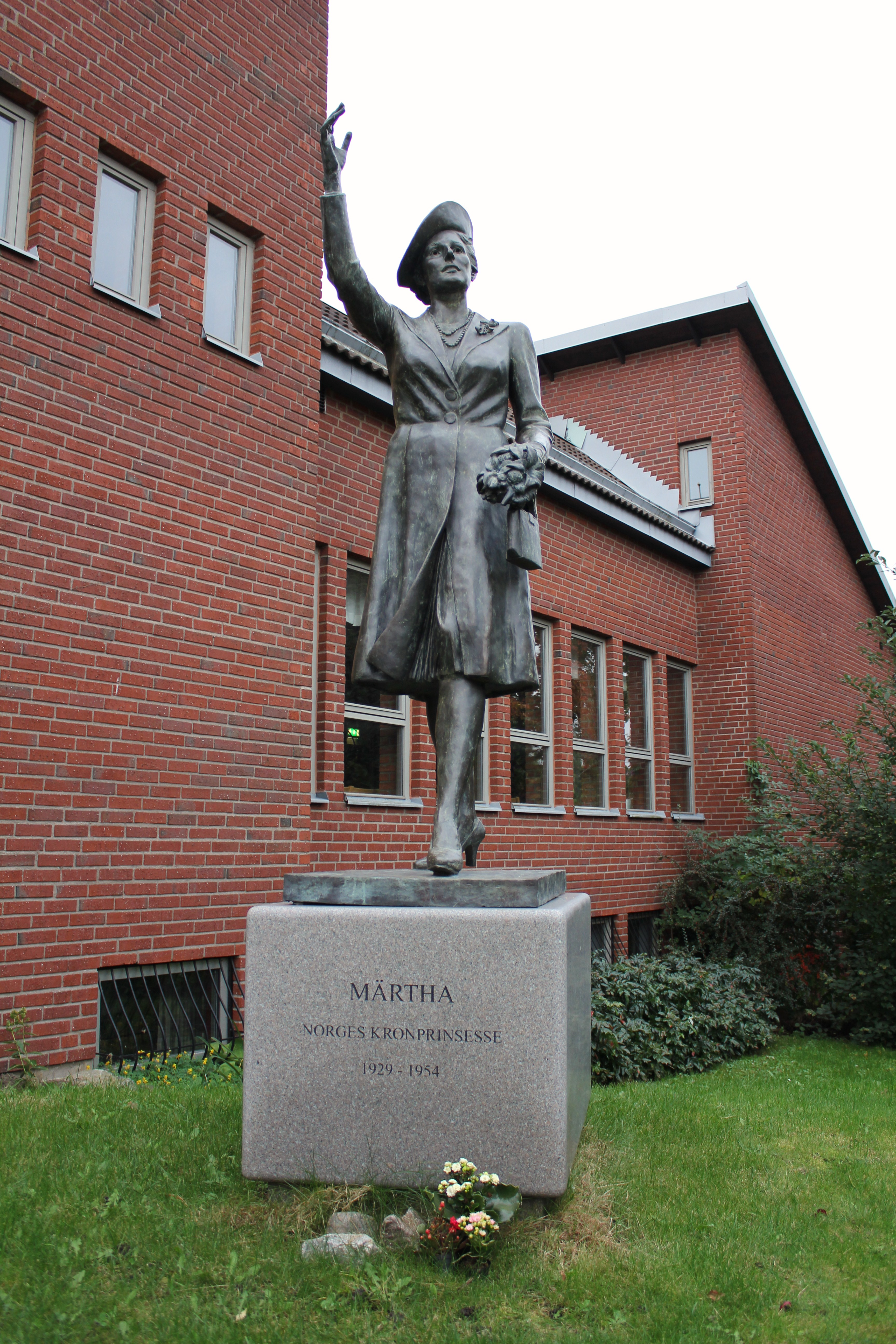 Kronprinsesse Märthas kirke, Norska kyrkan på Stigbergsgatan på Södermalm i Stockholm. Utanför kyrkan en skulptur föreställande kronprinsessan, utförd av Kirsten Kokkin.